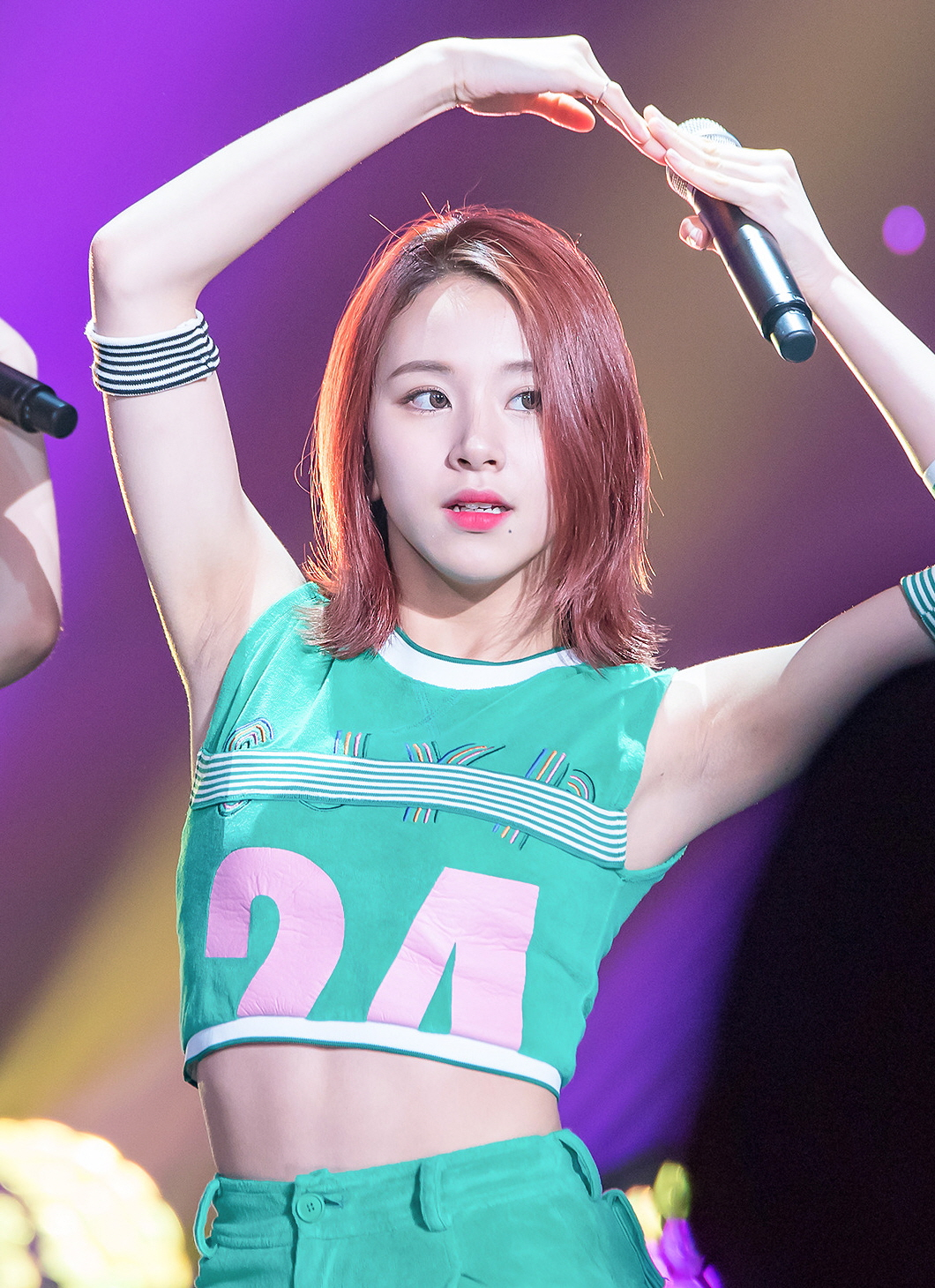 [16.06.13] 컬투쇼 상암 프리즘타워 공개방송 트와이스